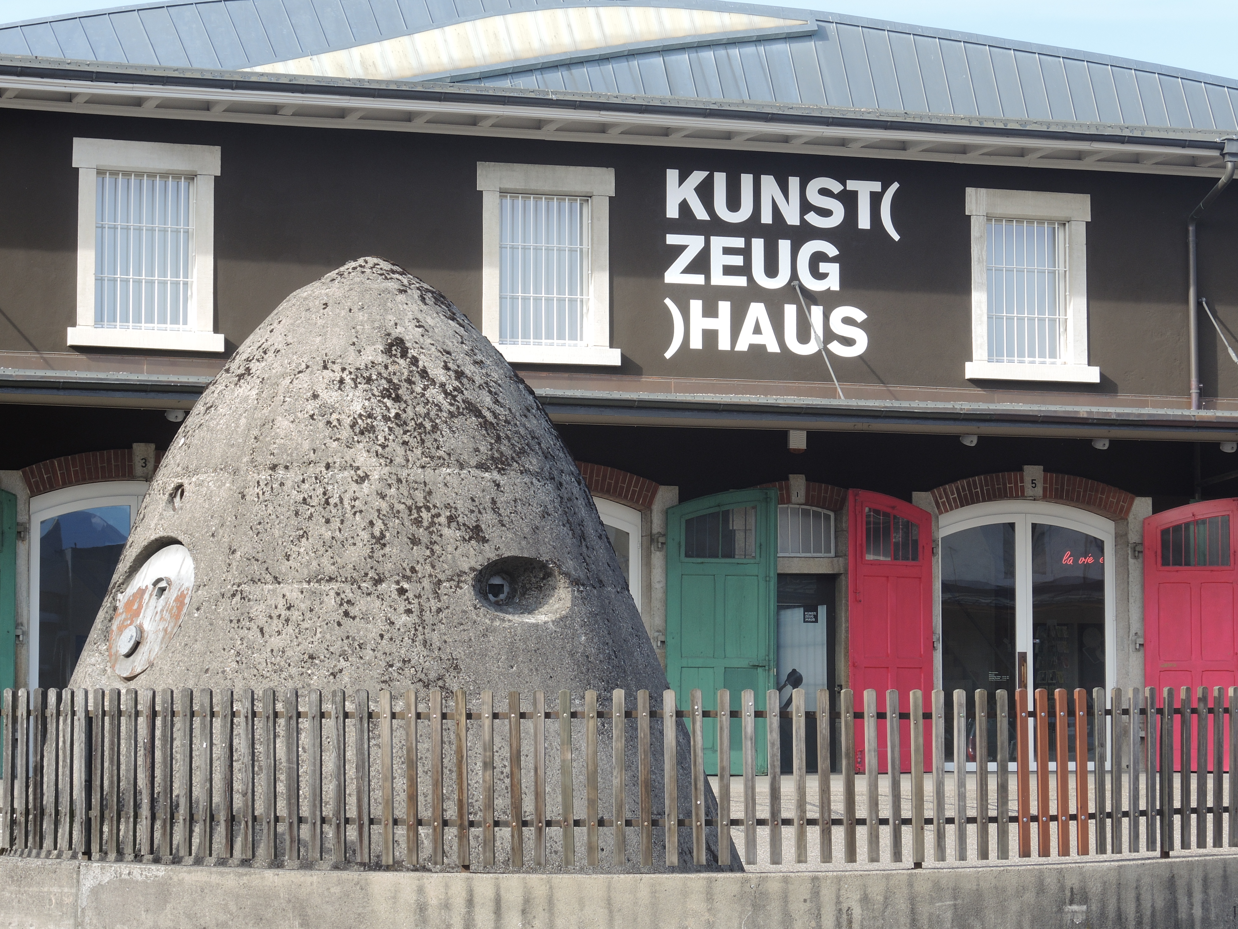 Kunst(zeug)haus in Rapperswil (Switzerland)